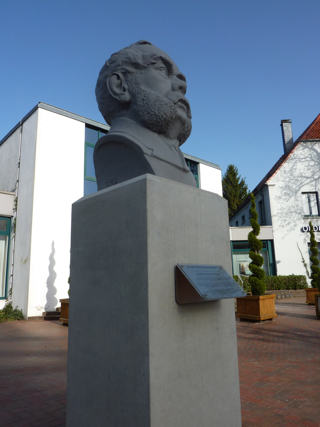 Schüßlerbüste in Bad Zwischenahn